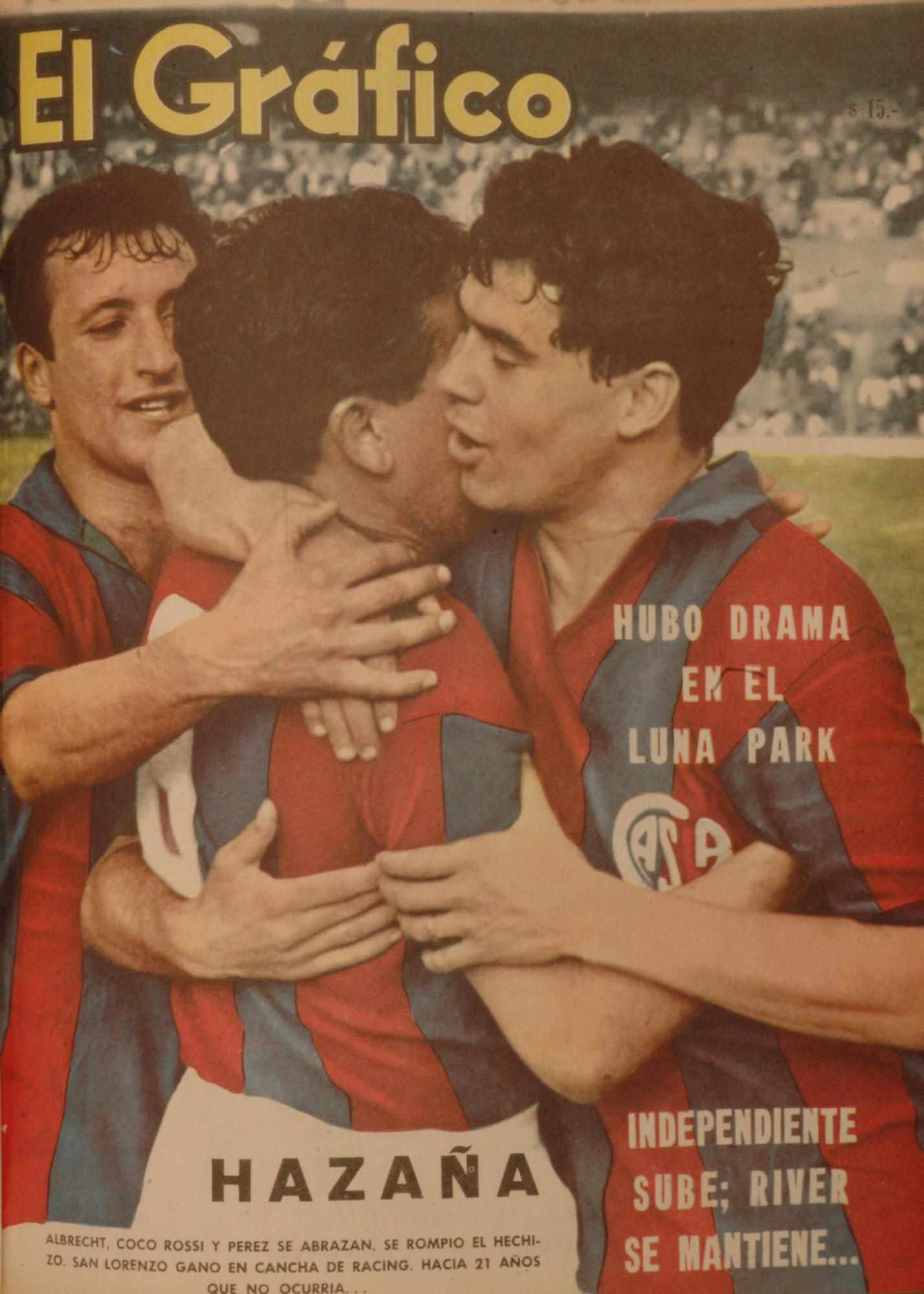 El Grafico del 09 de Octubre de 1963. Edicion 2296